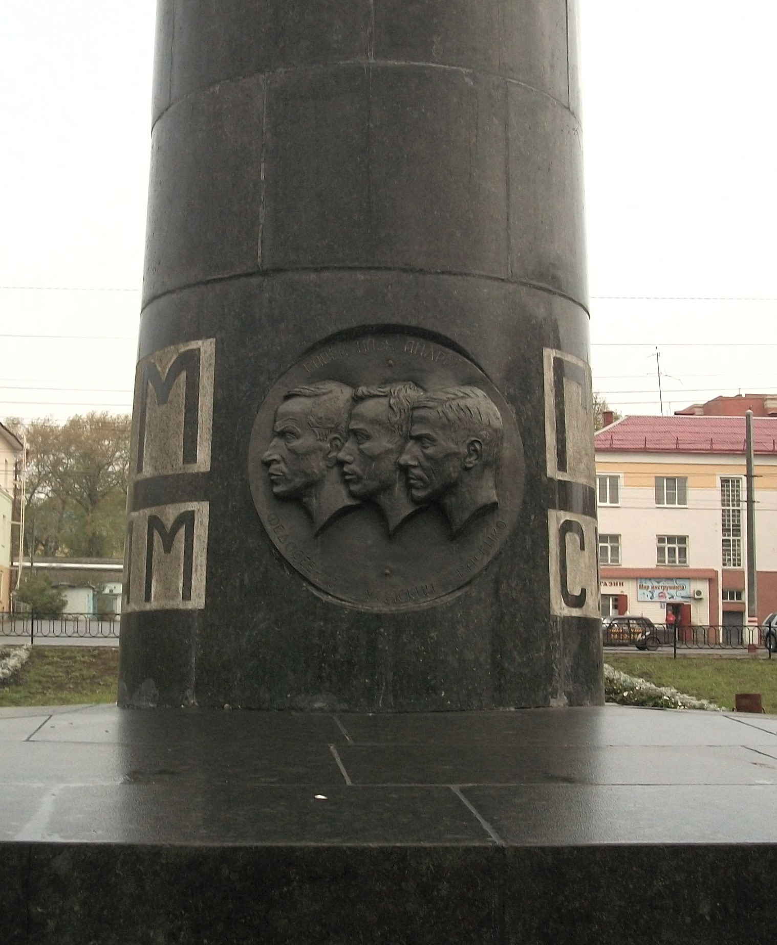 Медальон с портретами экипажа стратостата "Осоавиахим - 1" на постаменте памятника героям-стратонавтам в Саранске. Слева направо - Павел Федосеенко, Илья Усыскин, Андрей Васенко.